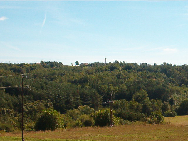 A képen Kétvölgy község Permise nevű falurésze látható, a ritkaházi oldalról nézve (Vas megye)